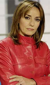 La periodista y presentadora española Pepa Bueno